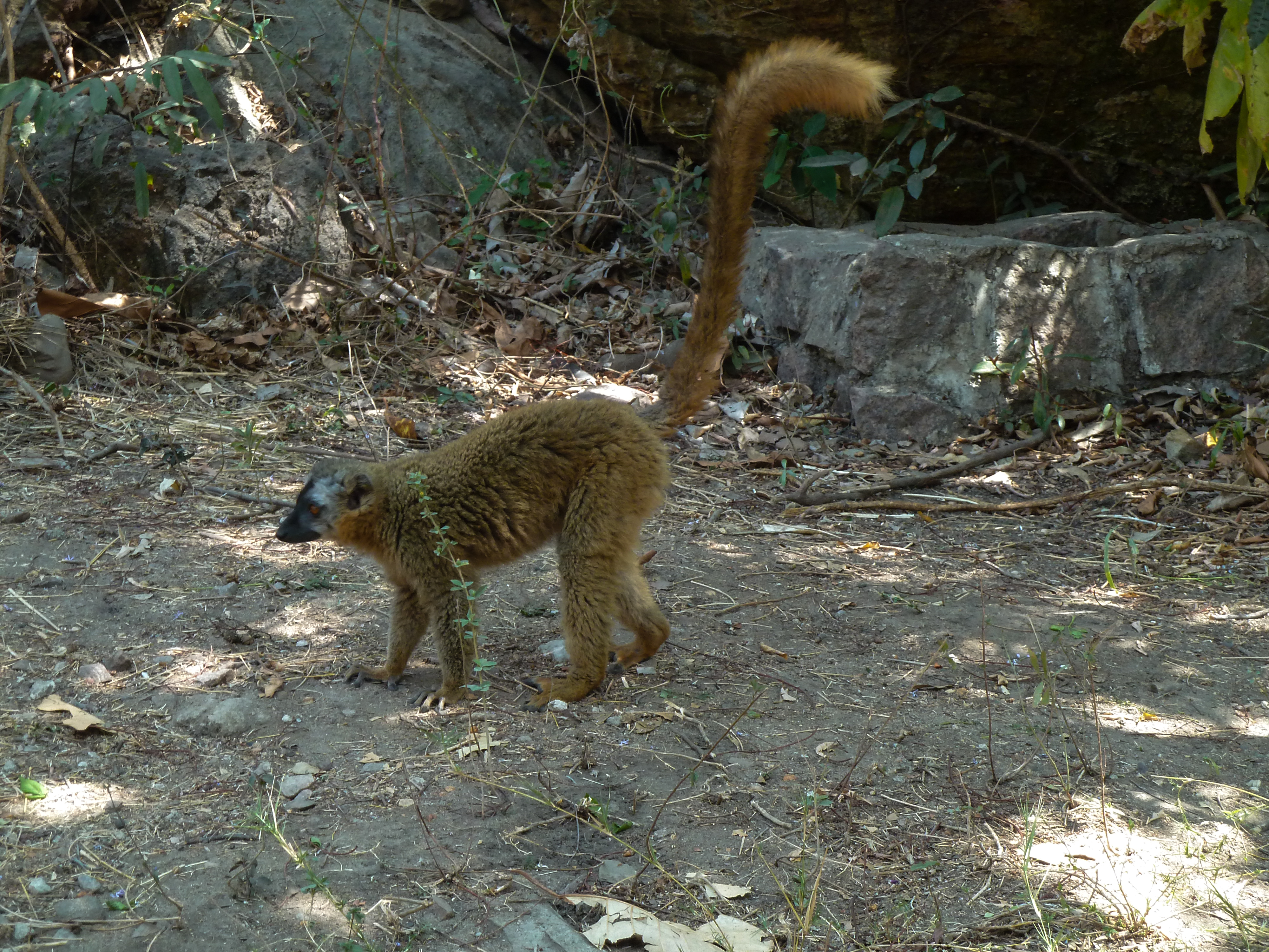 Eulemur rufifrons in NP Isalo